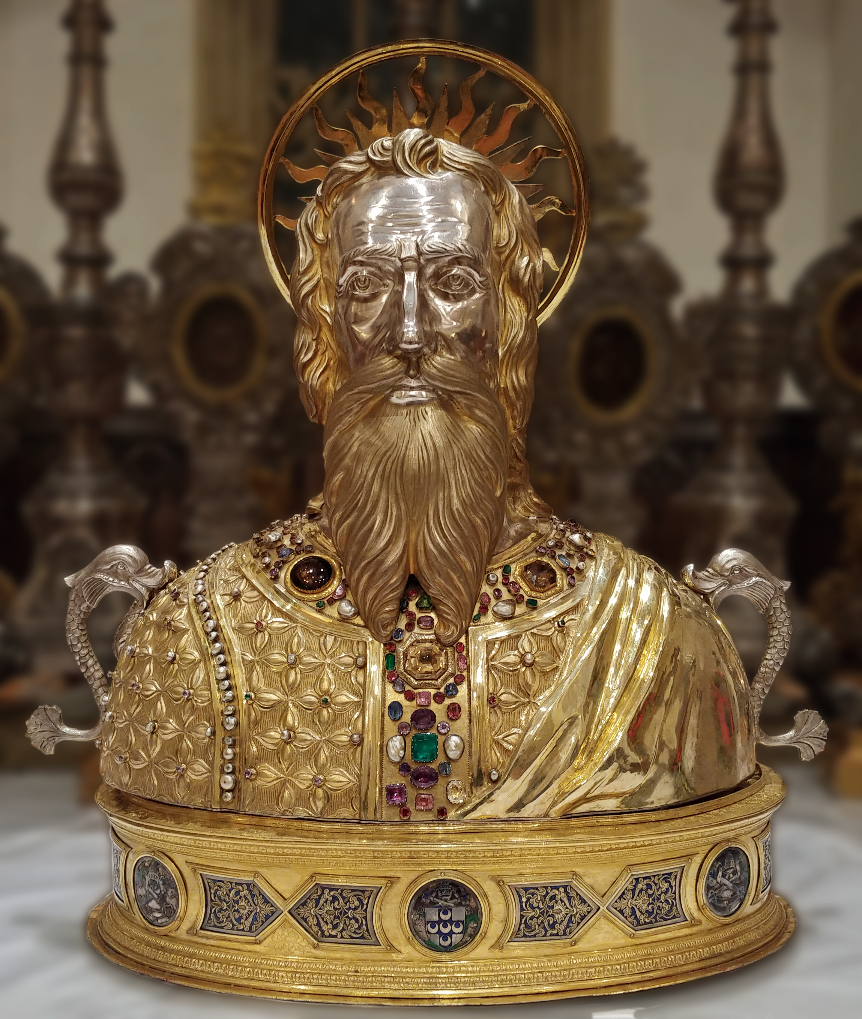 Simone di Giovanni Ghini, Busto reliquiario di sant'Andrea, 1462-63 (Pienza, Museo diocesano, dalla concattedrale di Santa Maria Assunta).